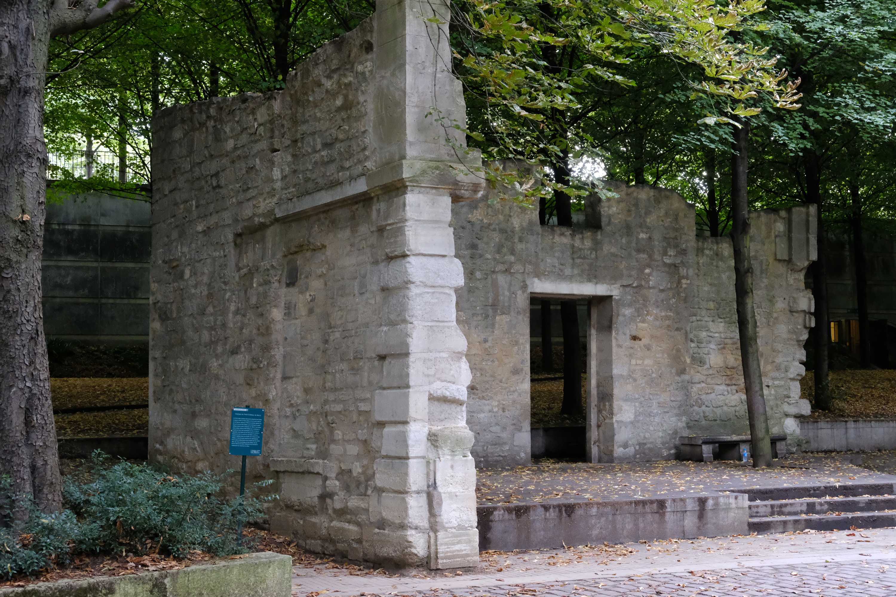 Parc de Bercy (vestiges du Petit-Château de Bercy, dit Pâté-Bercy) - Paris XII